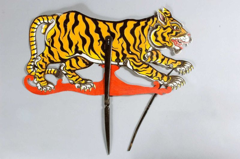 Schaduwpop. Wajang Kantjil pop tijger